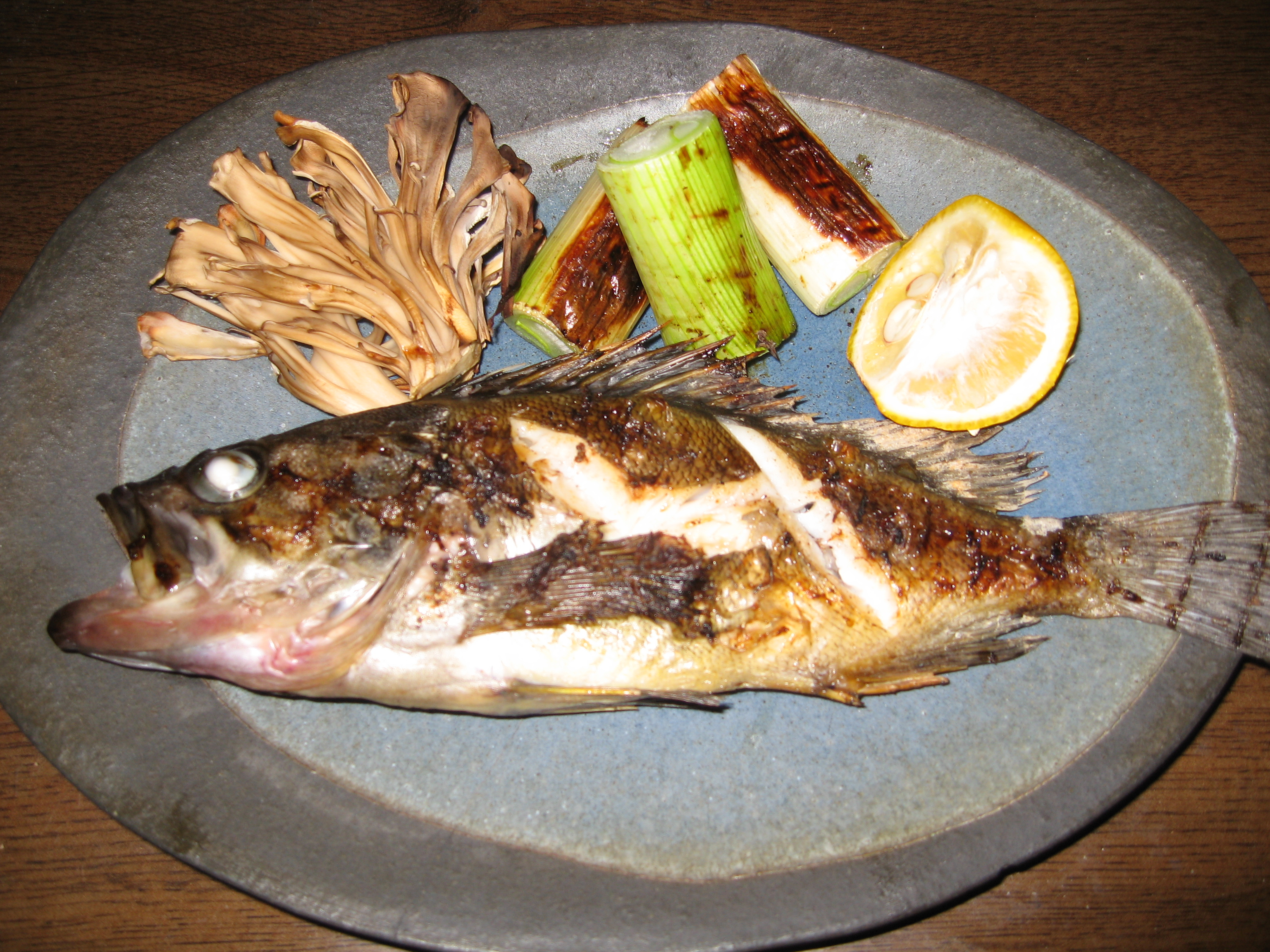 ソイの焼き魚（塩焼き）、マイタケとネギ、ユズを添えて